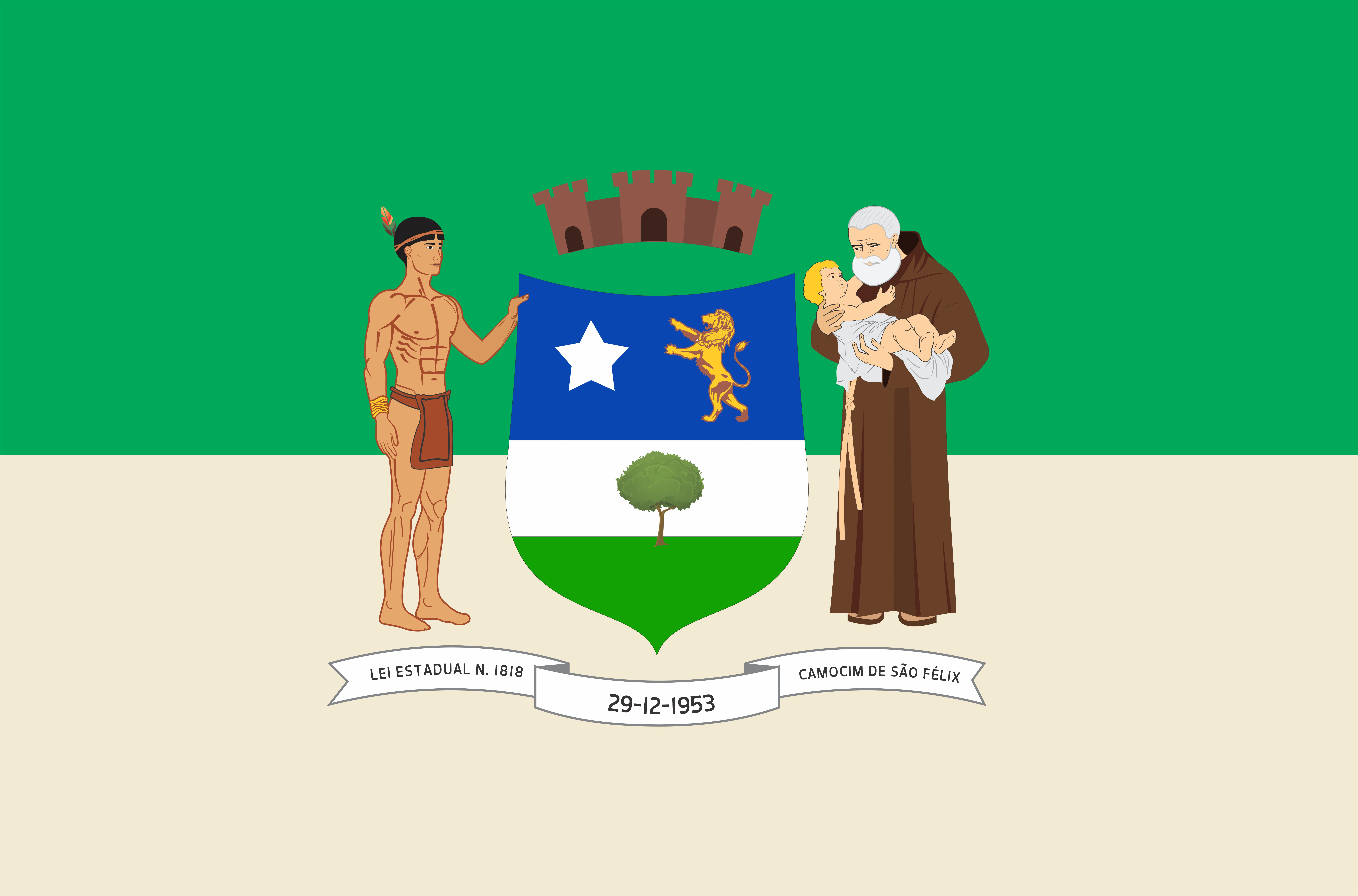 Bandeira Camocim de São Félix